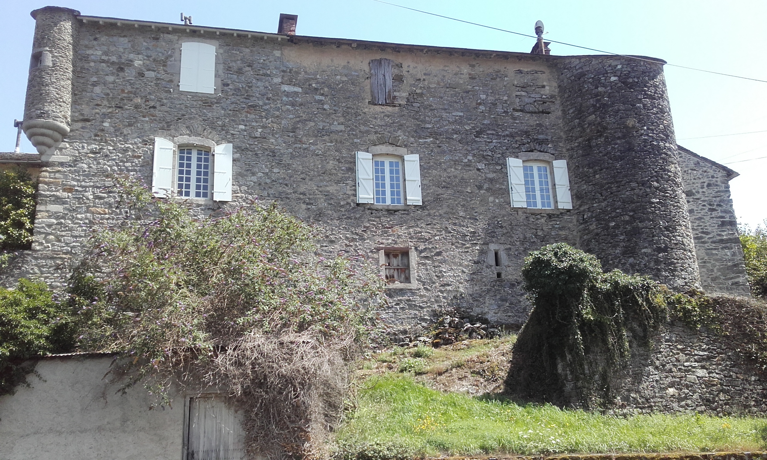 Espérausses (Tarn) : Façade Ouest du bâtiment sud du château